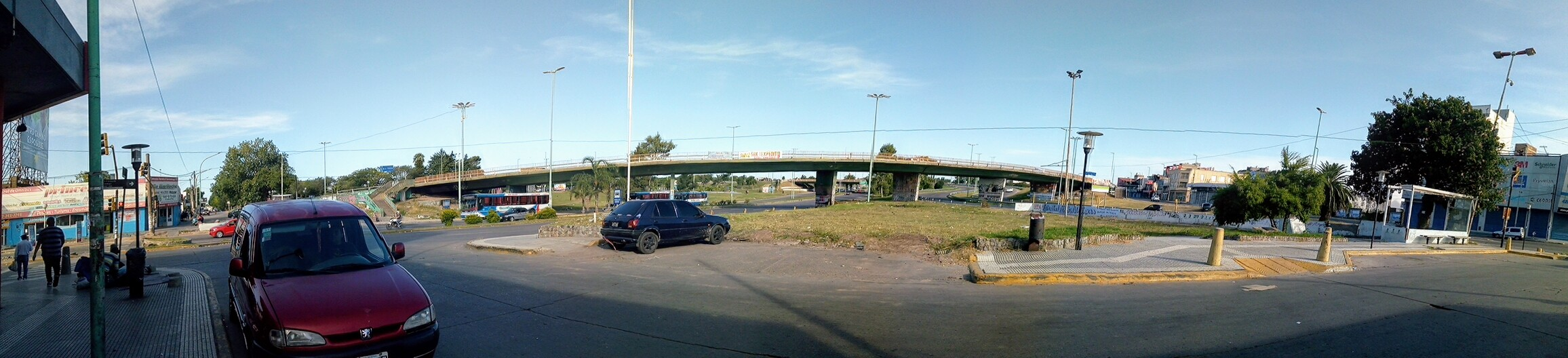 Panoramica puentes Cruce Varela